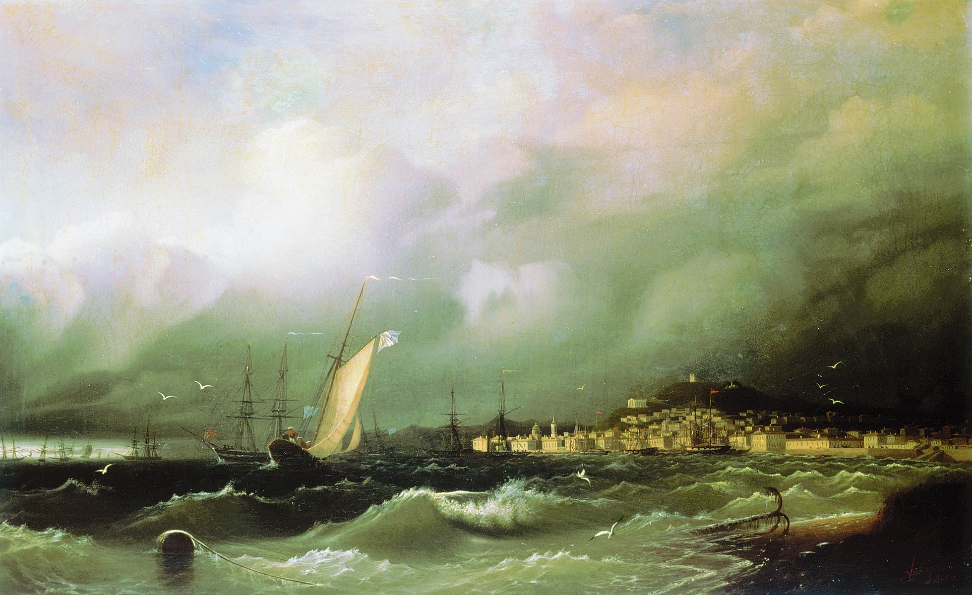 Старая Феодосия. 1845 Холст, маслою. 60х96см. Национальная галерея Армении, Ереван